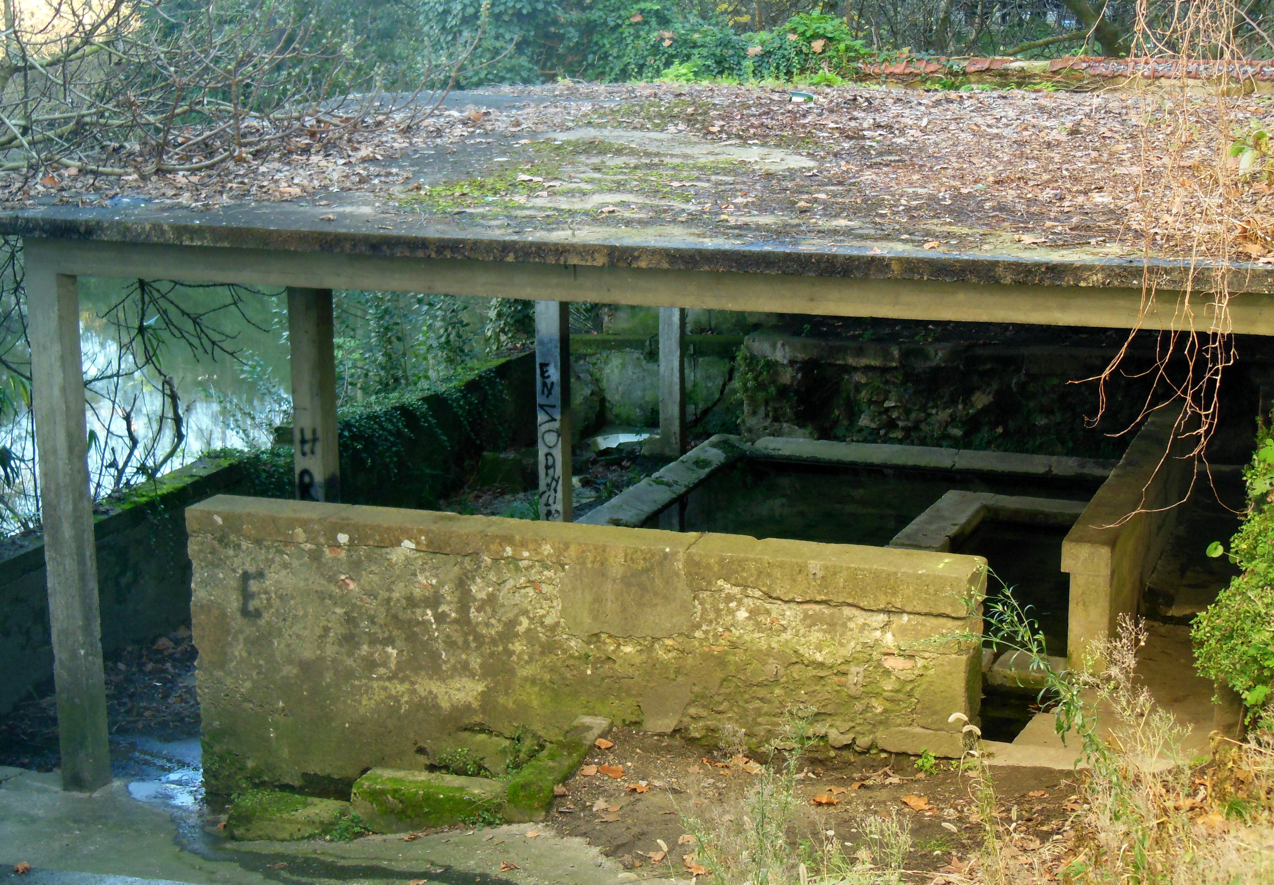 Lavoir de la Tannerie, place Raymond Poincarré, à Mont-de-Marsan